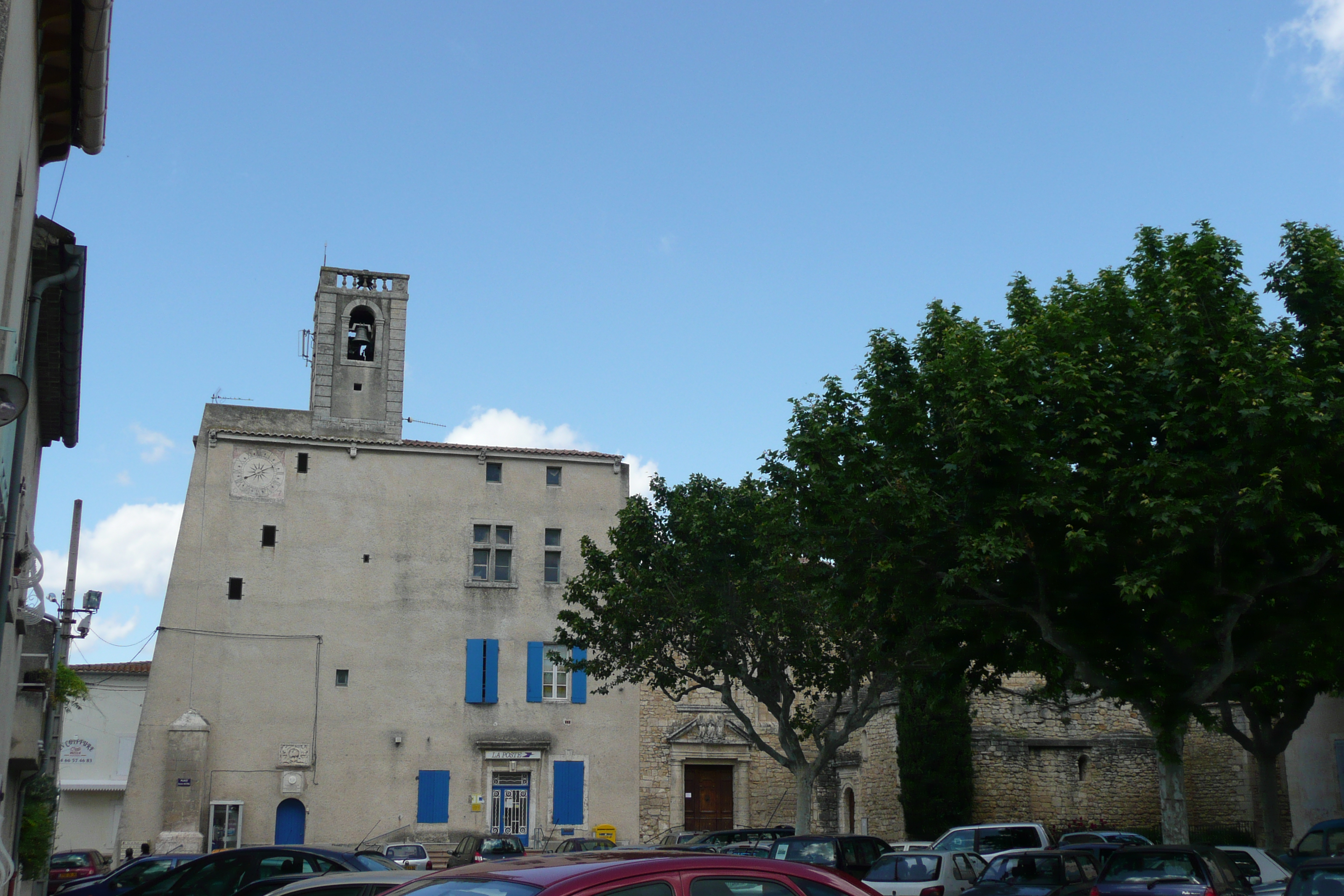 Eglise à Vallabrègues.